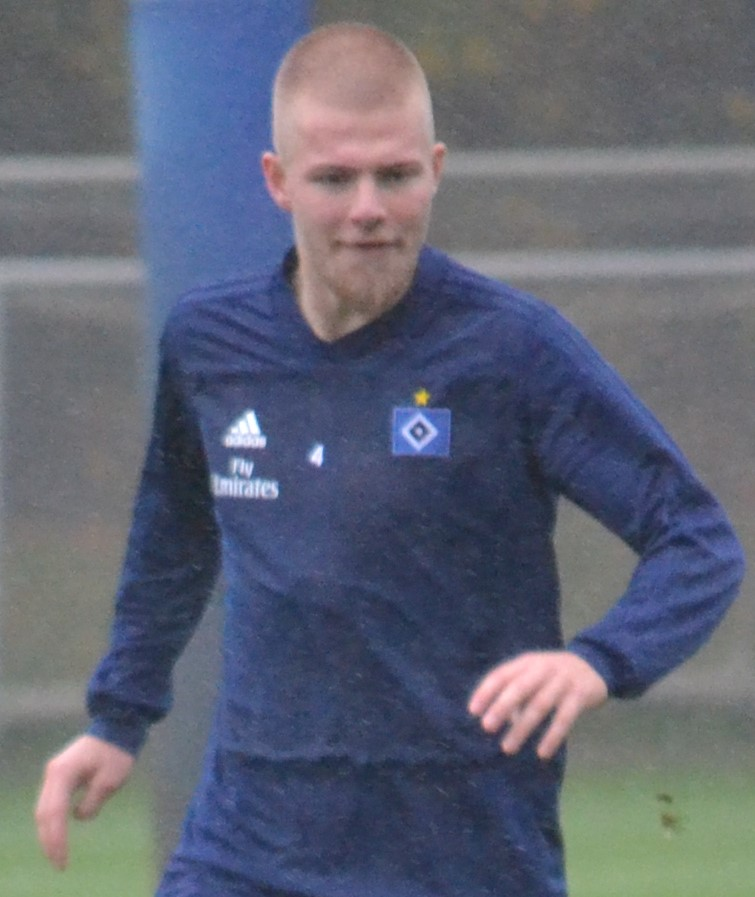 Rick van Drongelen beim Training des Hamburger SV am 18. Oktober 2018.